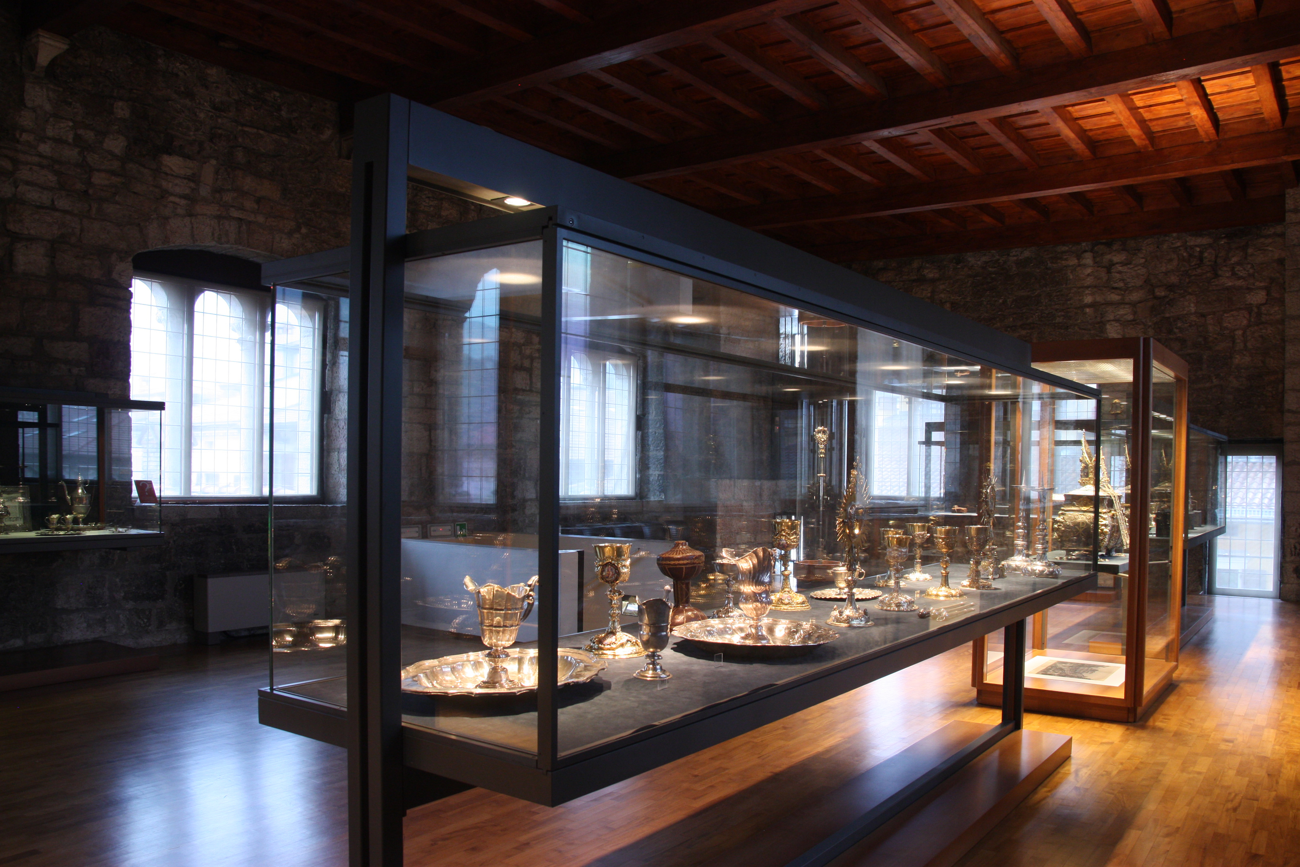 La sala del tesoro all'interno del Museo Diocesano Tridentino; vi è esposto il Tesoro della Cattedrale di San Viglio.